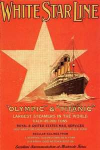 Reklame (med sikkerhed fra før forliset i 1912!) for White Star Lines (dengang) nye skibe, Titanic og Olympic.